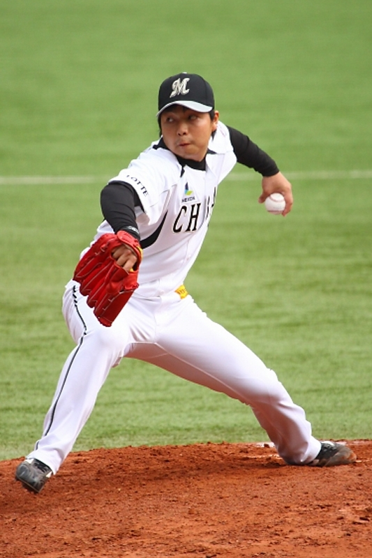 日本プロ野球 千葉ロッテマリーンズ 松永昂大投手